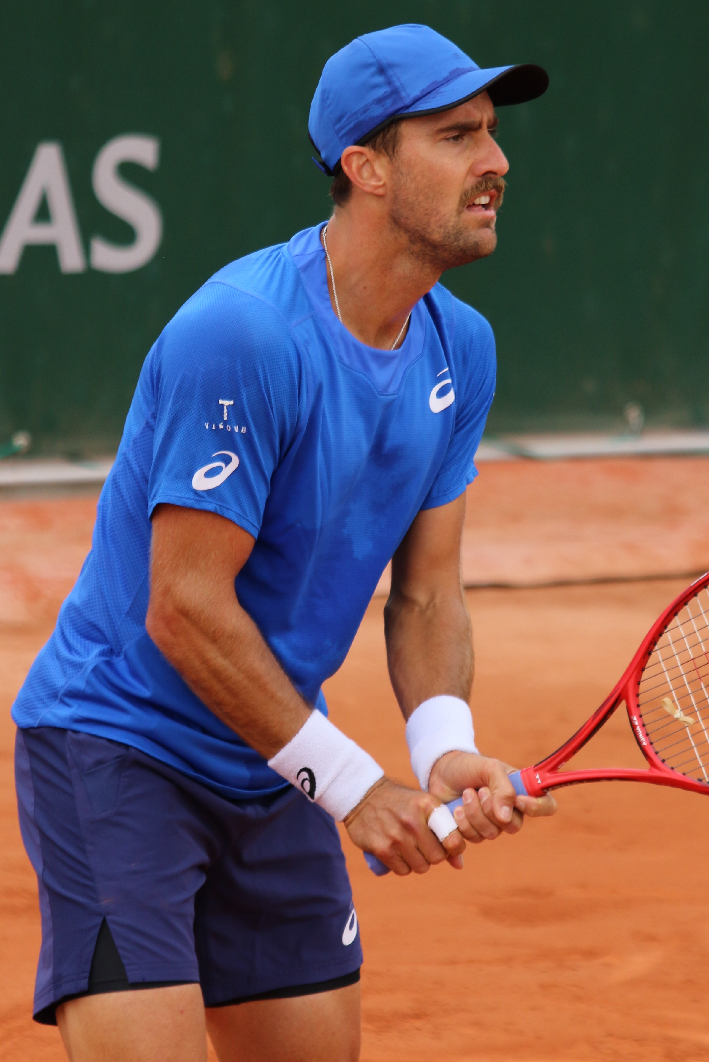 Johnson RG19 (10)